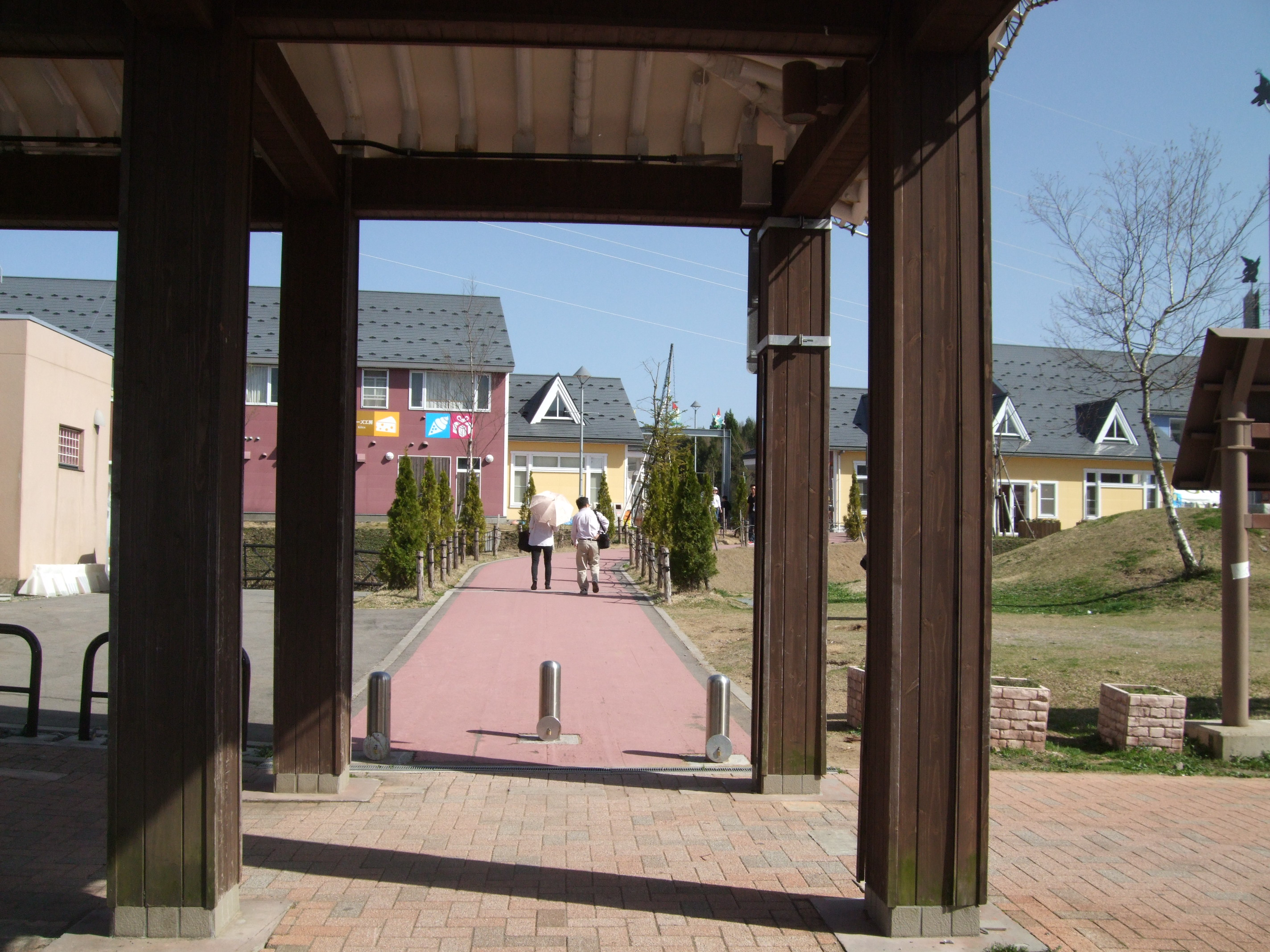 クックラひるがの SA側の入口